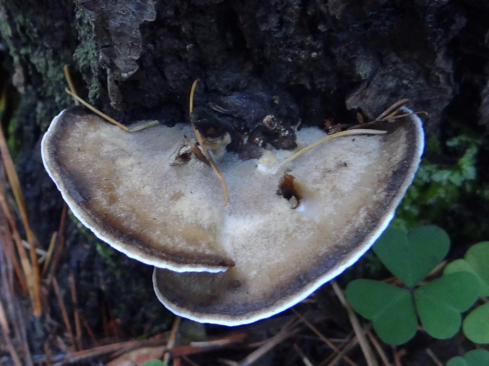 Bjerkandera adusta